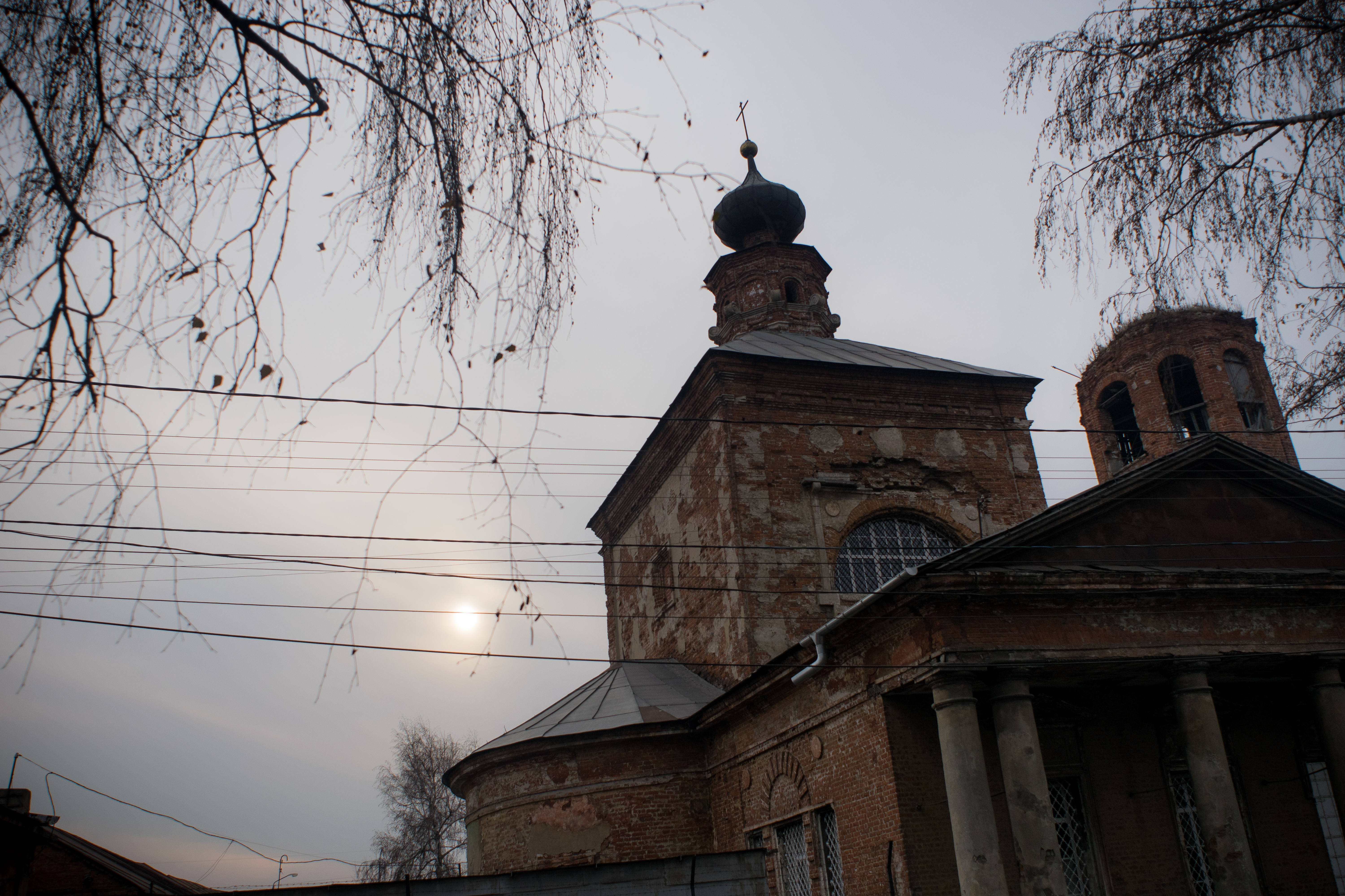 Церковь Рождества Христова (Тульская область, Тула, улица Карла Маркса, 26)